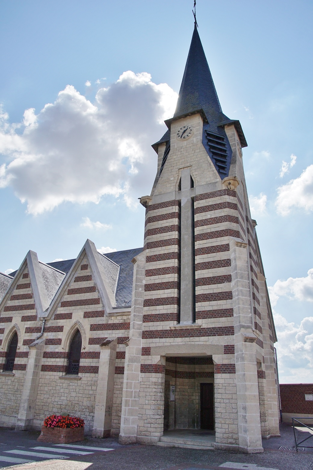 Église Notre Dame de Beaulieu-les-Fontaines (60).